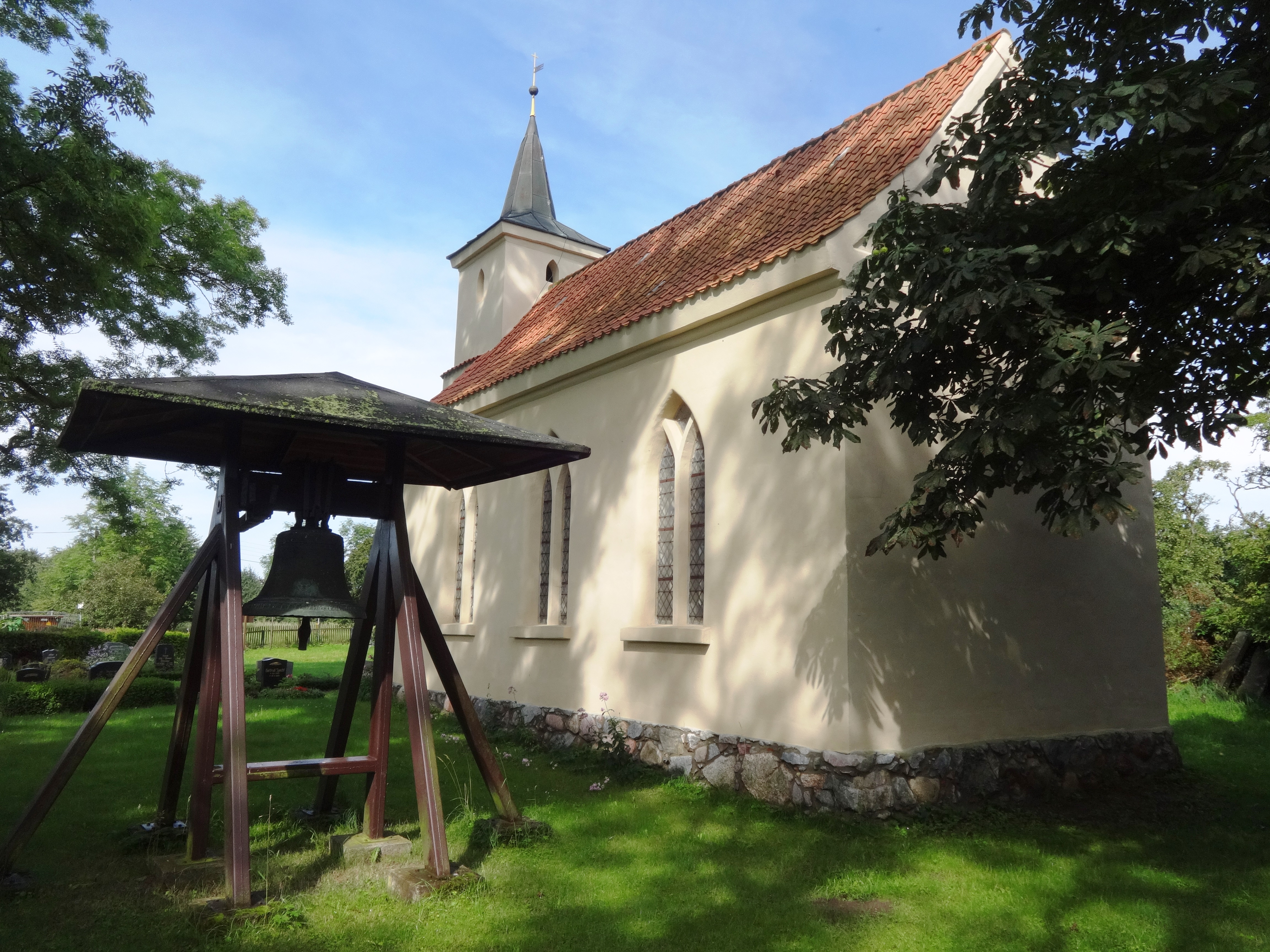 Die Kapelle Jager ist ein Kirchenbau aus dem Jahr 1830 in der Gemeinde Sundhagen im Landkreis Vorpommern-Rügen. Die Kirchenausstattung stammt aus der Bauzeit.